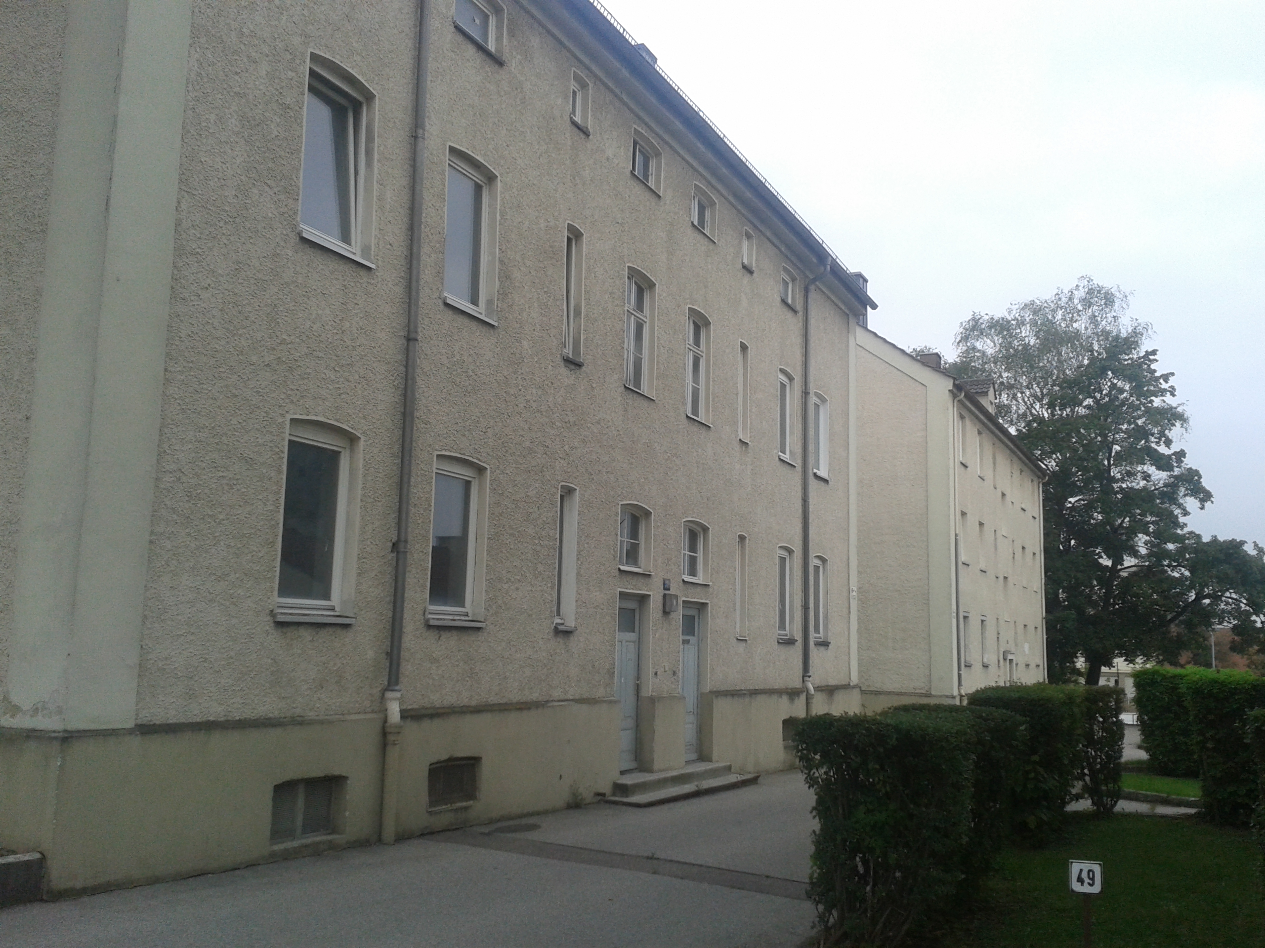 Sebastiankolonie (ehemalige Werkssiedlung der MAN)